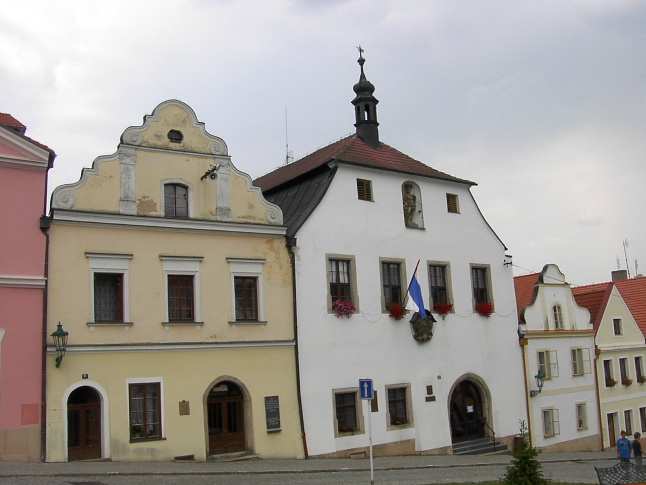 Townhall in Horšovský Týn